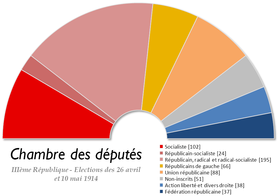 Chambre des députés française issue des élections législatives de 1914